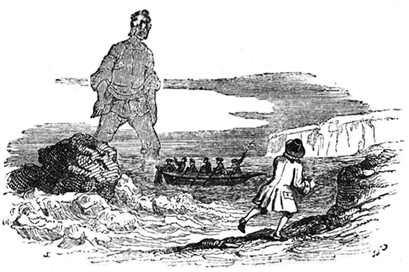 Szene aus Gullivers Reisen: Gulliver und seine Gefährten treffen in Brobdingnag auf einen riesenhaften Bewohner